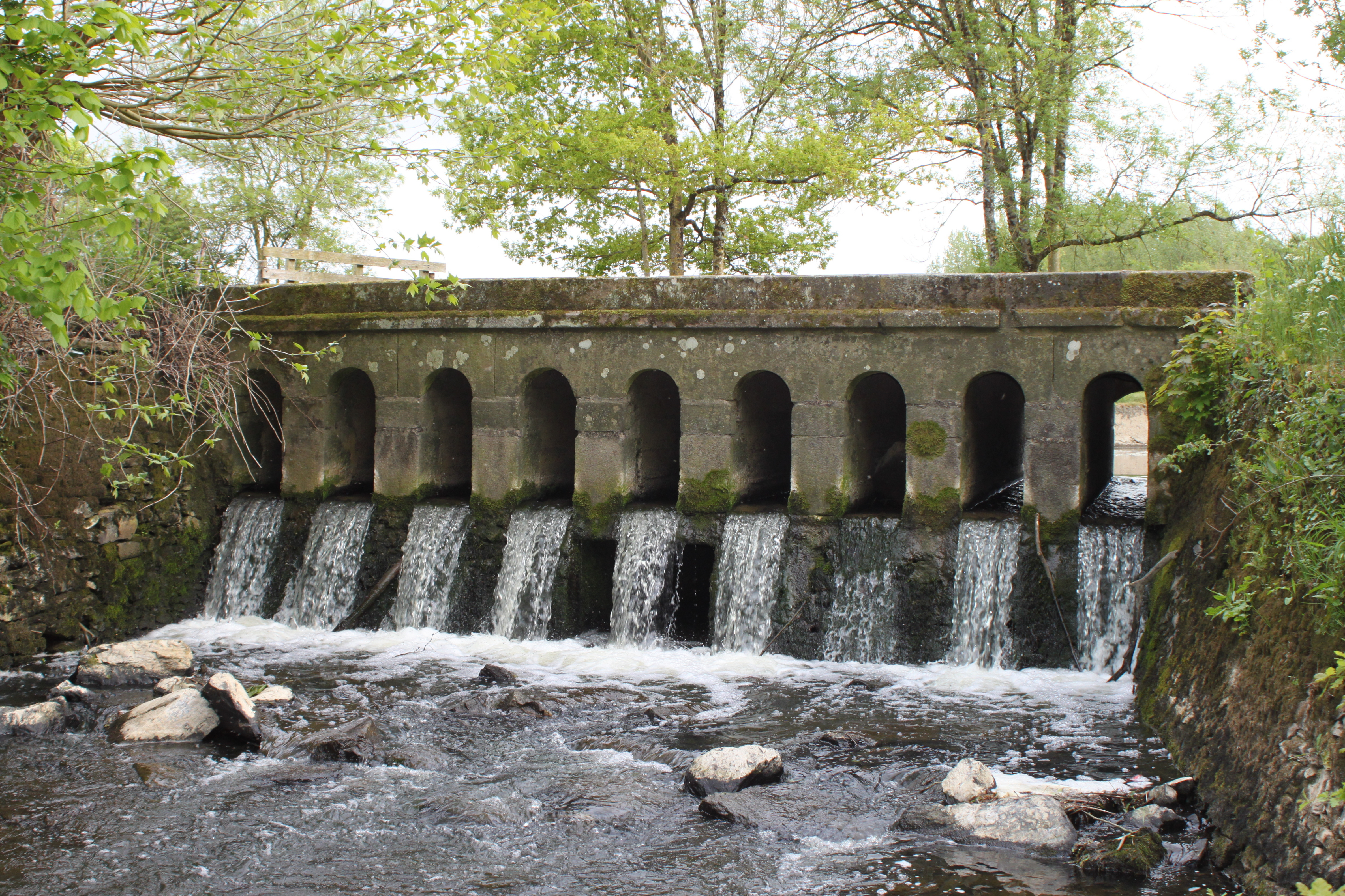 Pont sur l'Èvre, Fr-49-La Jubaudière.